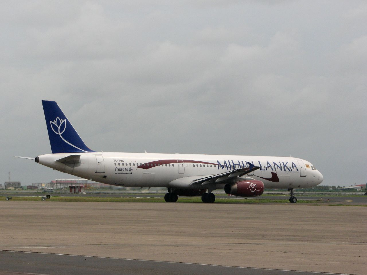 Mihin Lanka A-321-131